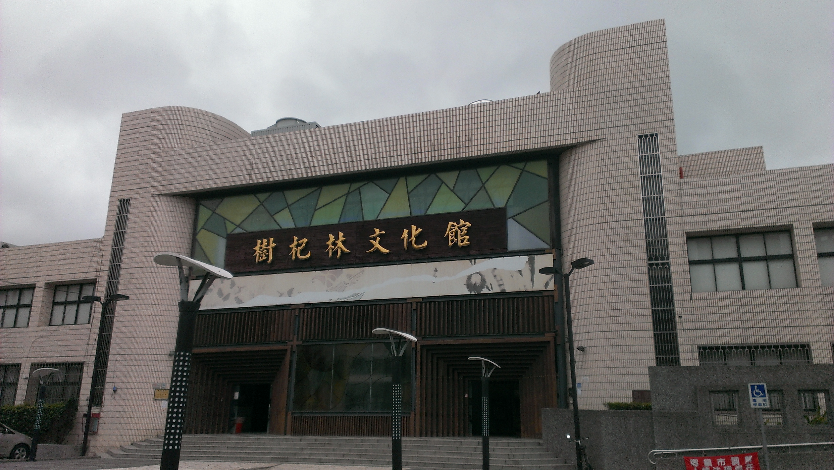 新竹縣竹東鎮樹杞林文化館